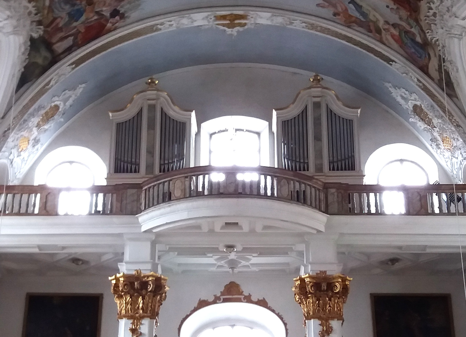 Orgel von Balthasar Pröbstl in der Studienkirche Dillingen an der Donau, gebaut 1871